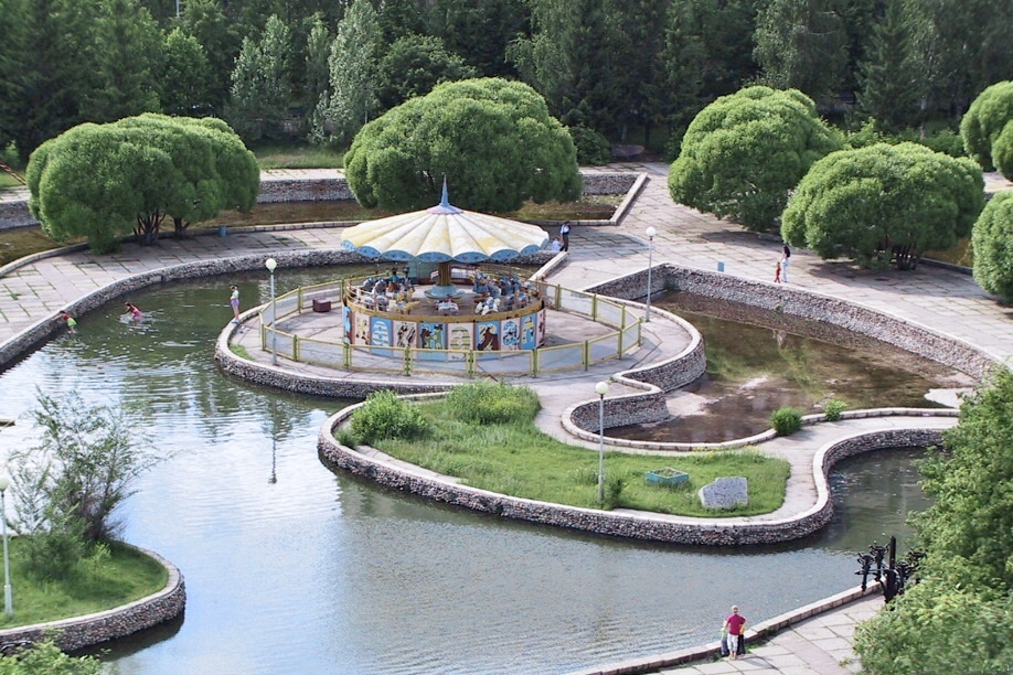 Детский парк в Автозаводском районе Тольятти